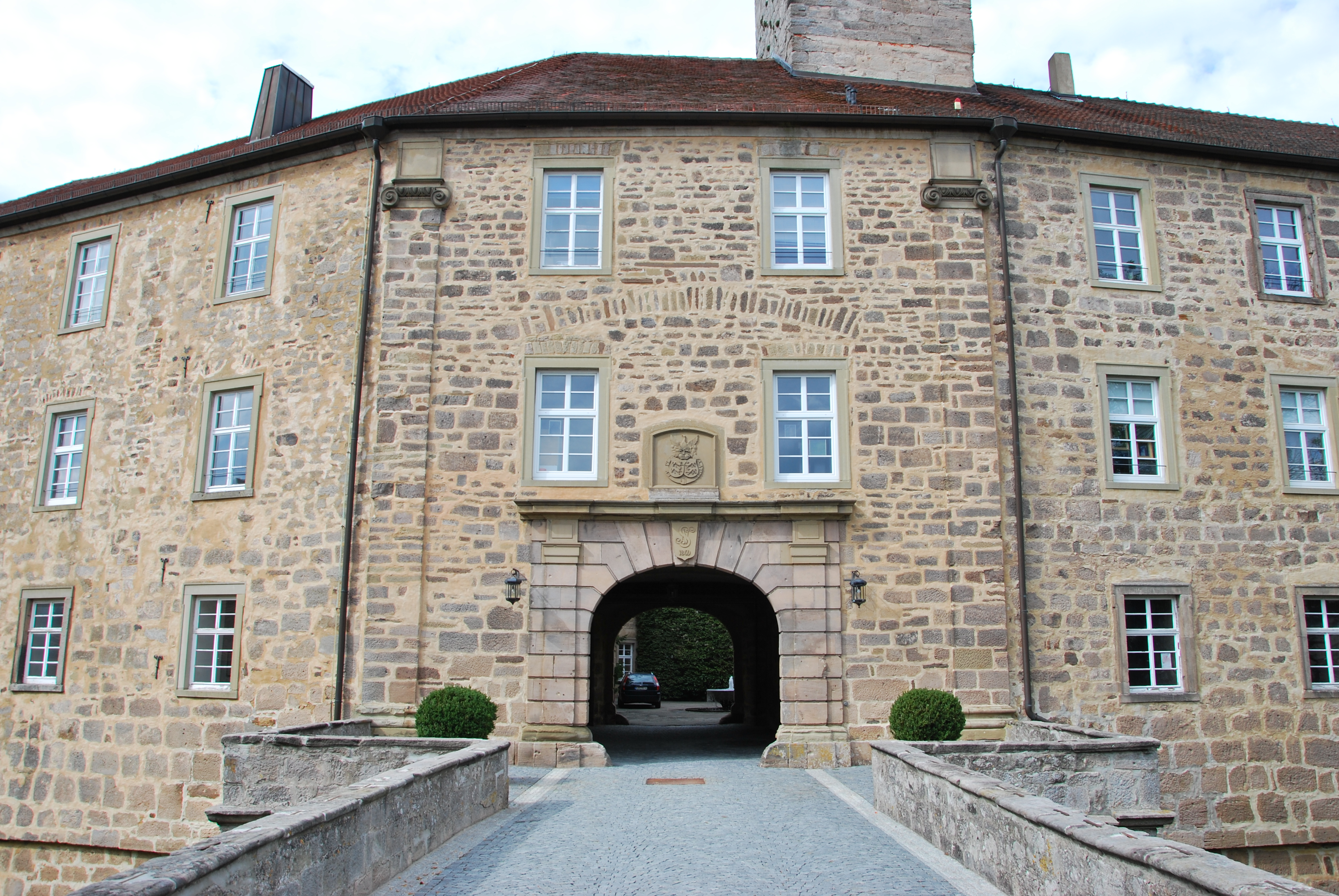 Schloss Waldenburg - Brücke über den Burggraben und Eingang zum Innenhof.